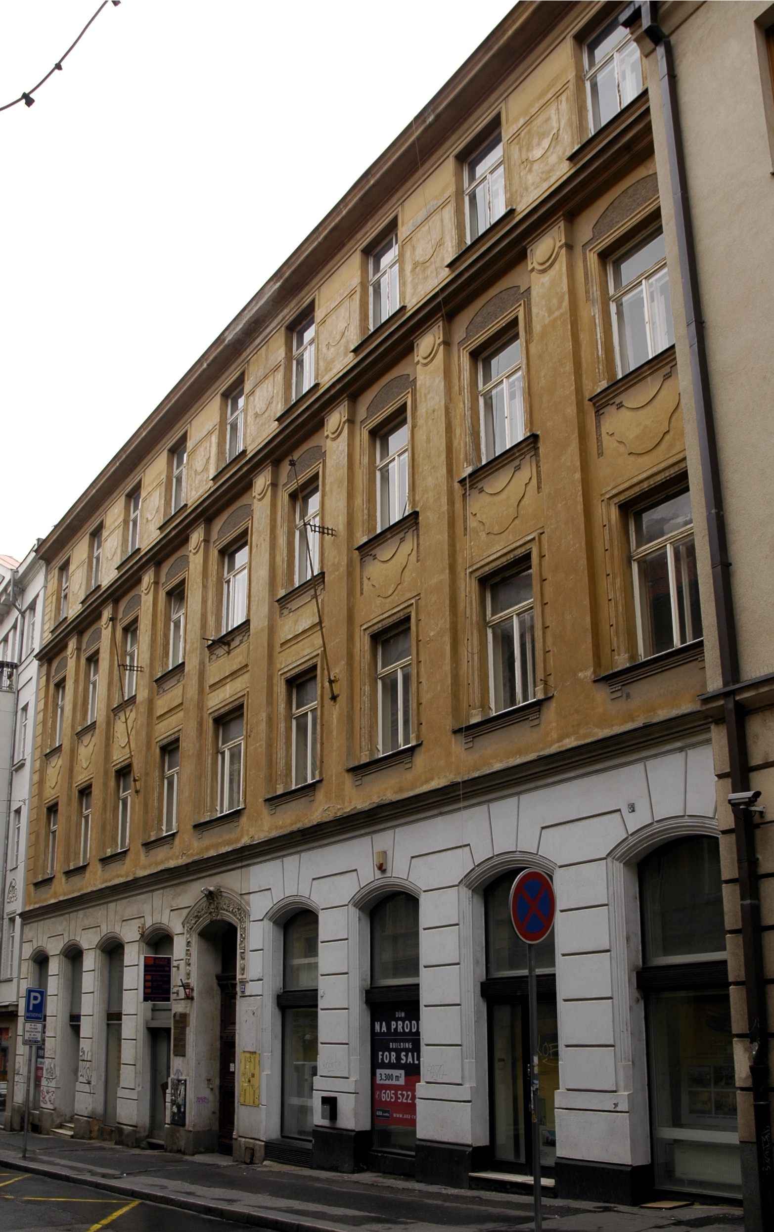 Smetschkagasse 22 in Prag, Sitz der Katholisch Akademischen Verbindung Saxo Bavaria 1908 bis zu Ihrer Auflösung 1938, heutiger Strassen-Name Ve Smečkách. Aufnahme aus dem Jahre 2010. Das Gebäude war ursprünglich das Haus des deutschen Handwerkervereins und in seinem Eigentum. Viele deutssprachige Vereine waren dort angesiedelt.